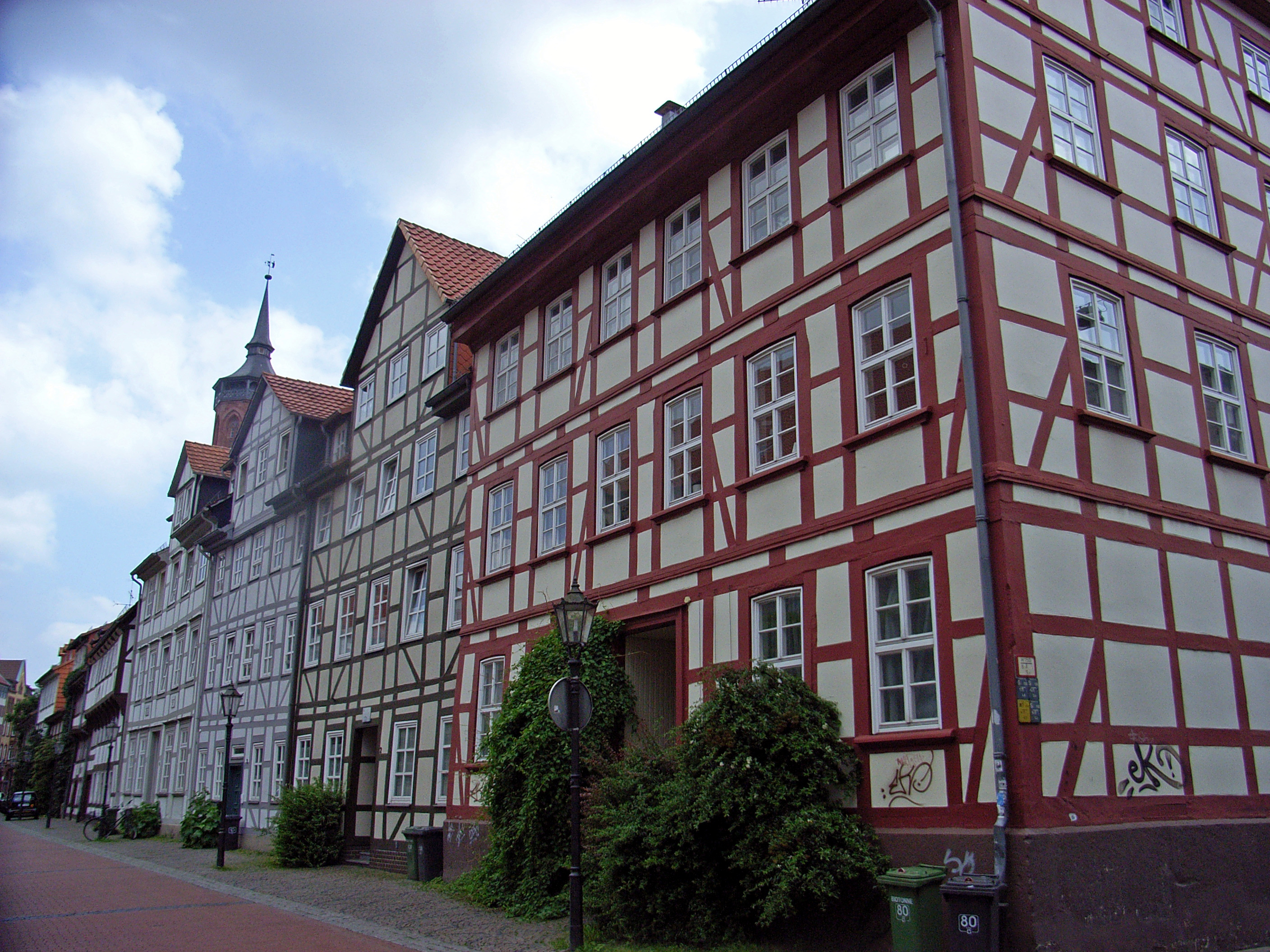 Dieses Bild zeigt einige historische Gebäude an der Paulinerstraße in Göttingen.